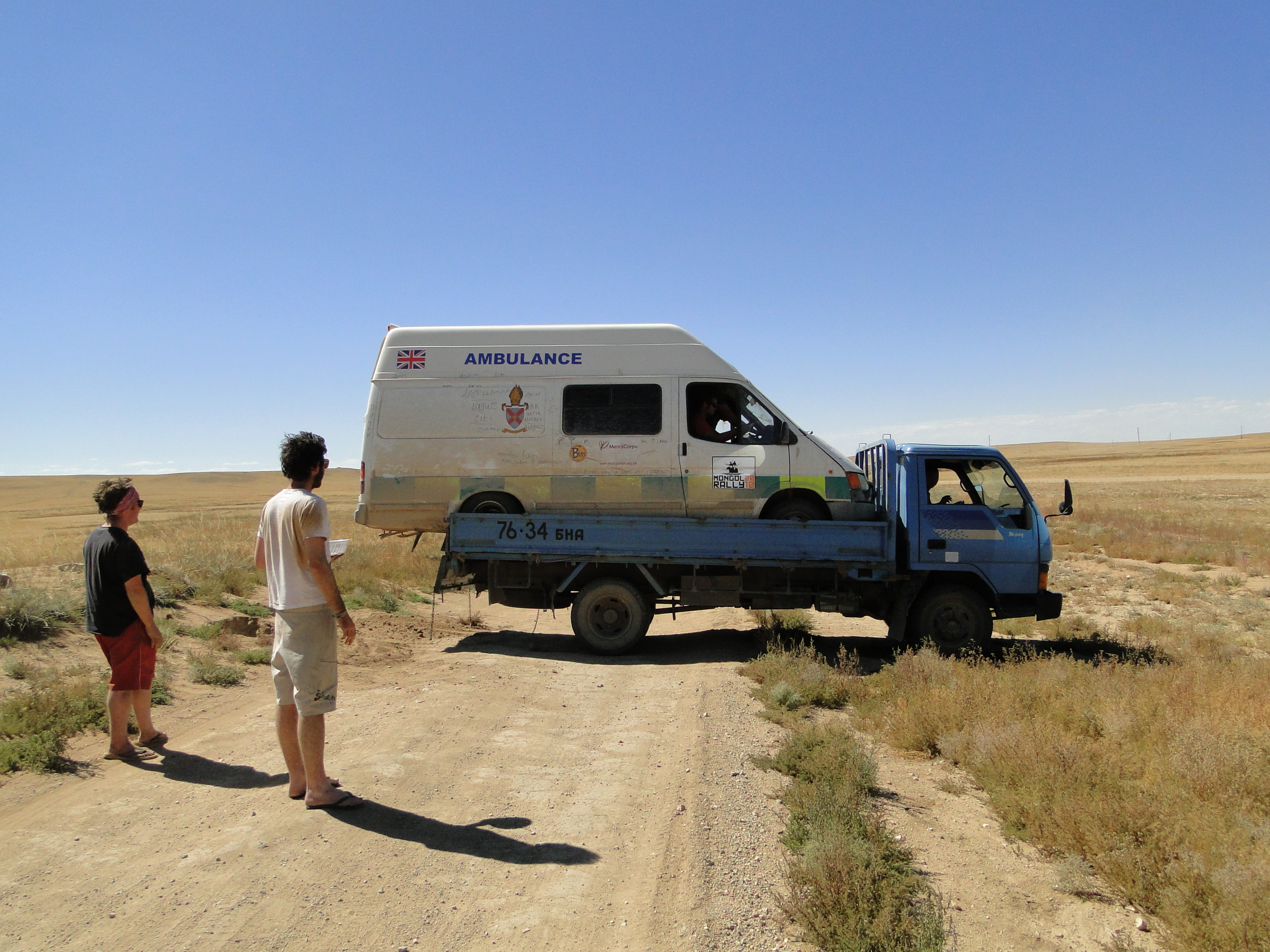 Mongol Rally 2010